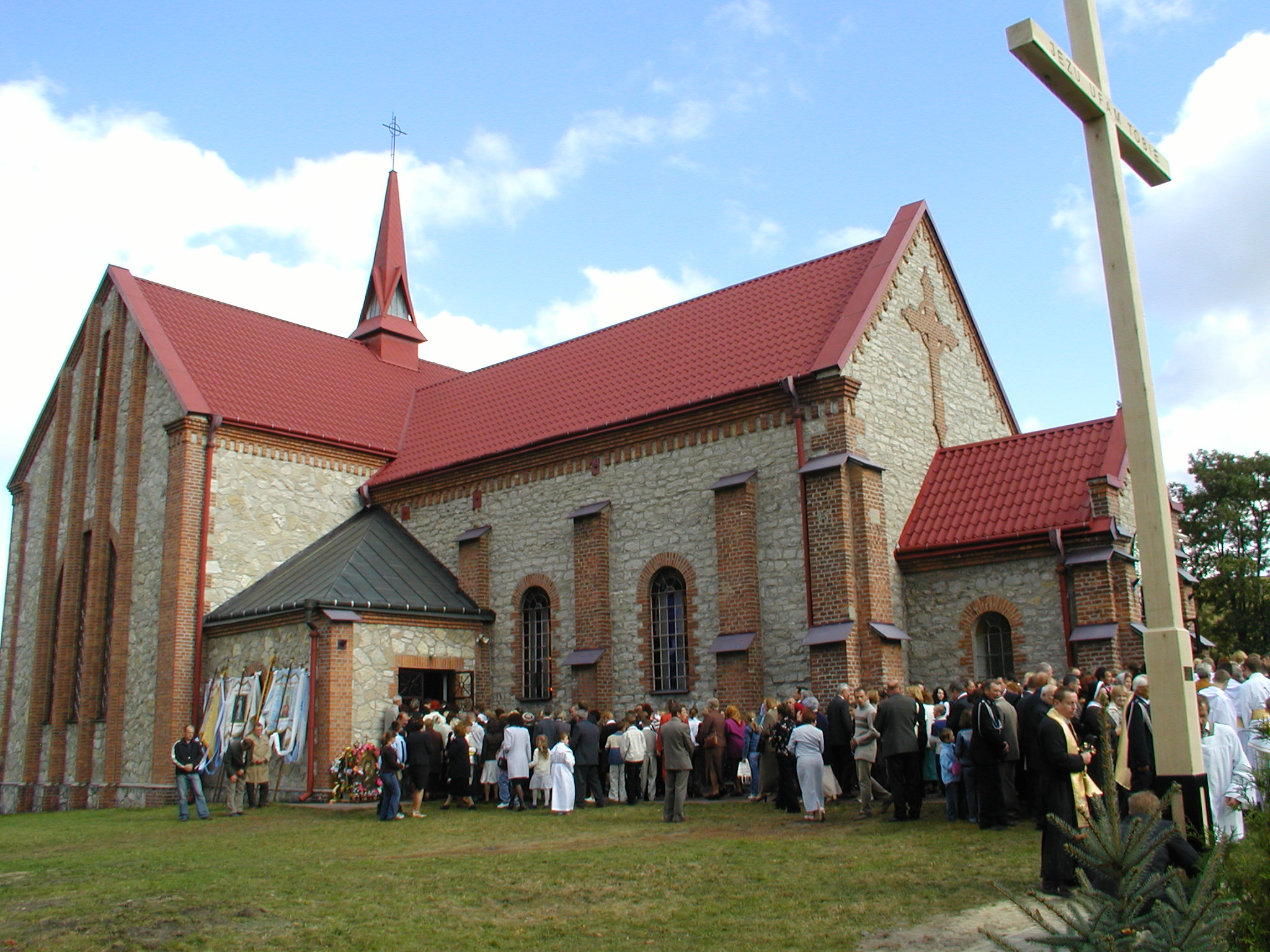 Kościół Parafialny p.w. Matki Bożej Różańcowej i Aniołów Stróżów w Lubyczy Królewskiej